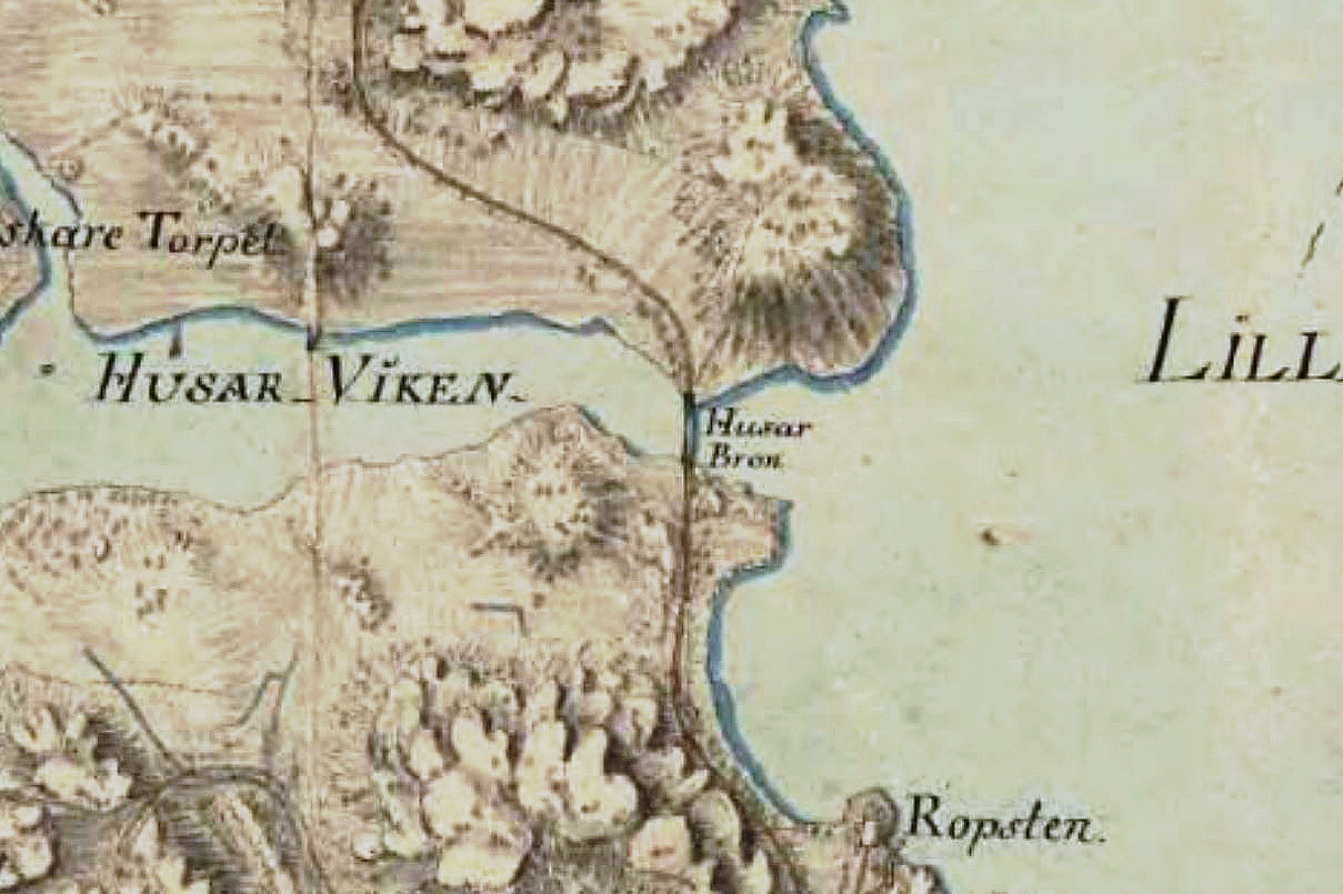 "Husarbron" över Husar Viken